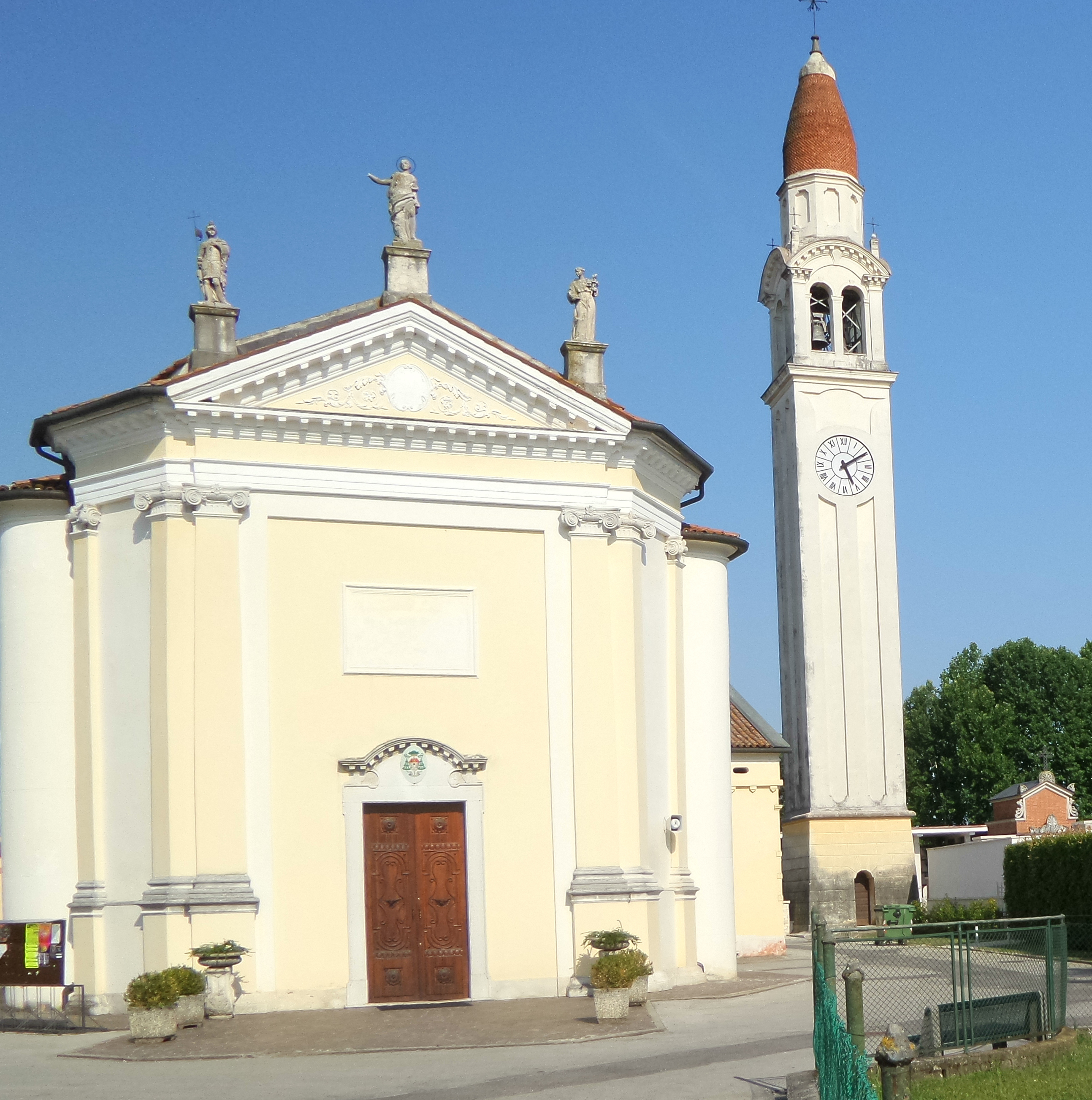 Chiesa parrocchiale di Schiavon